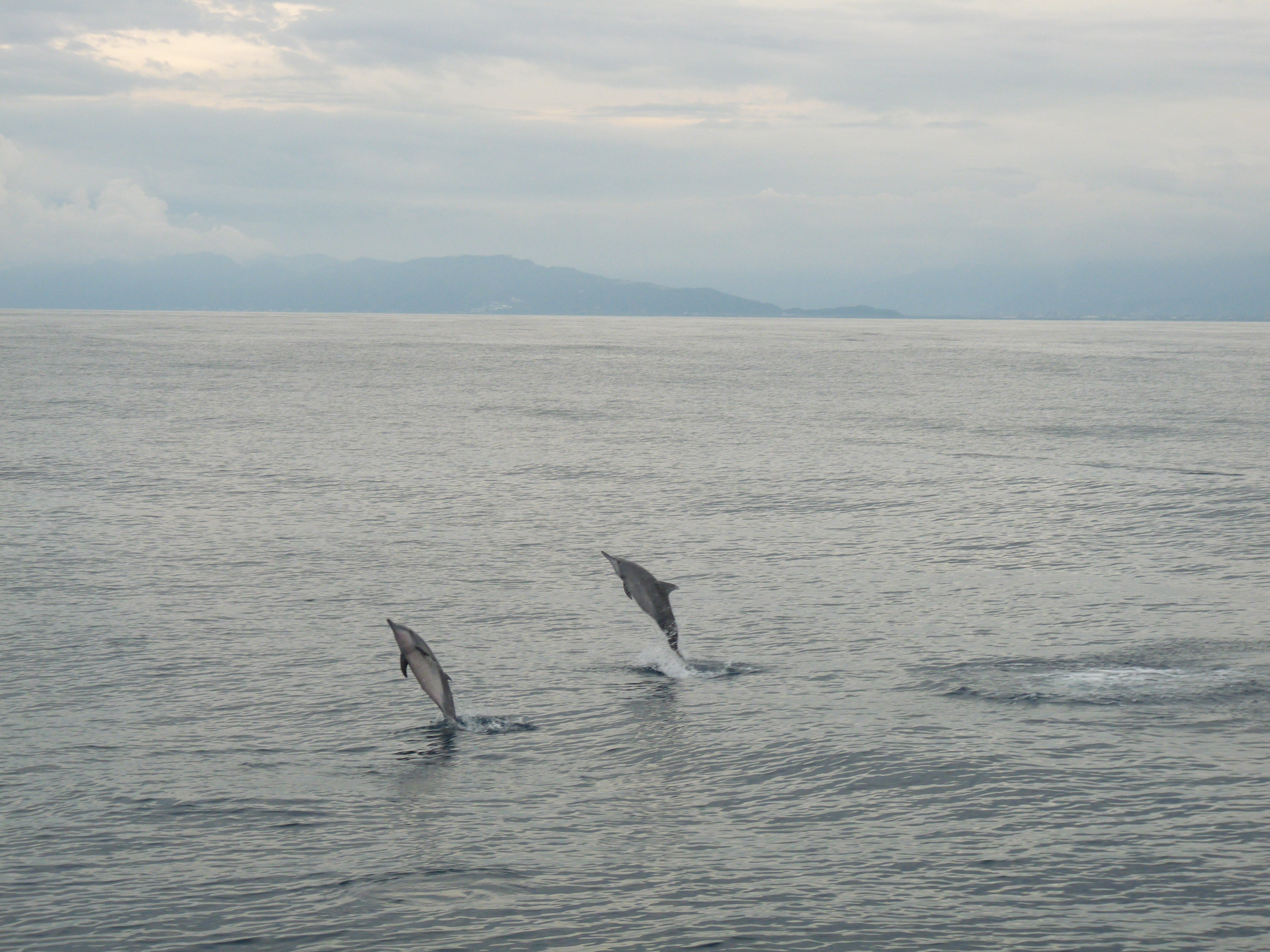 Hualien